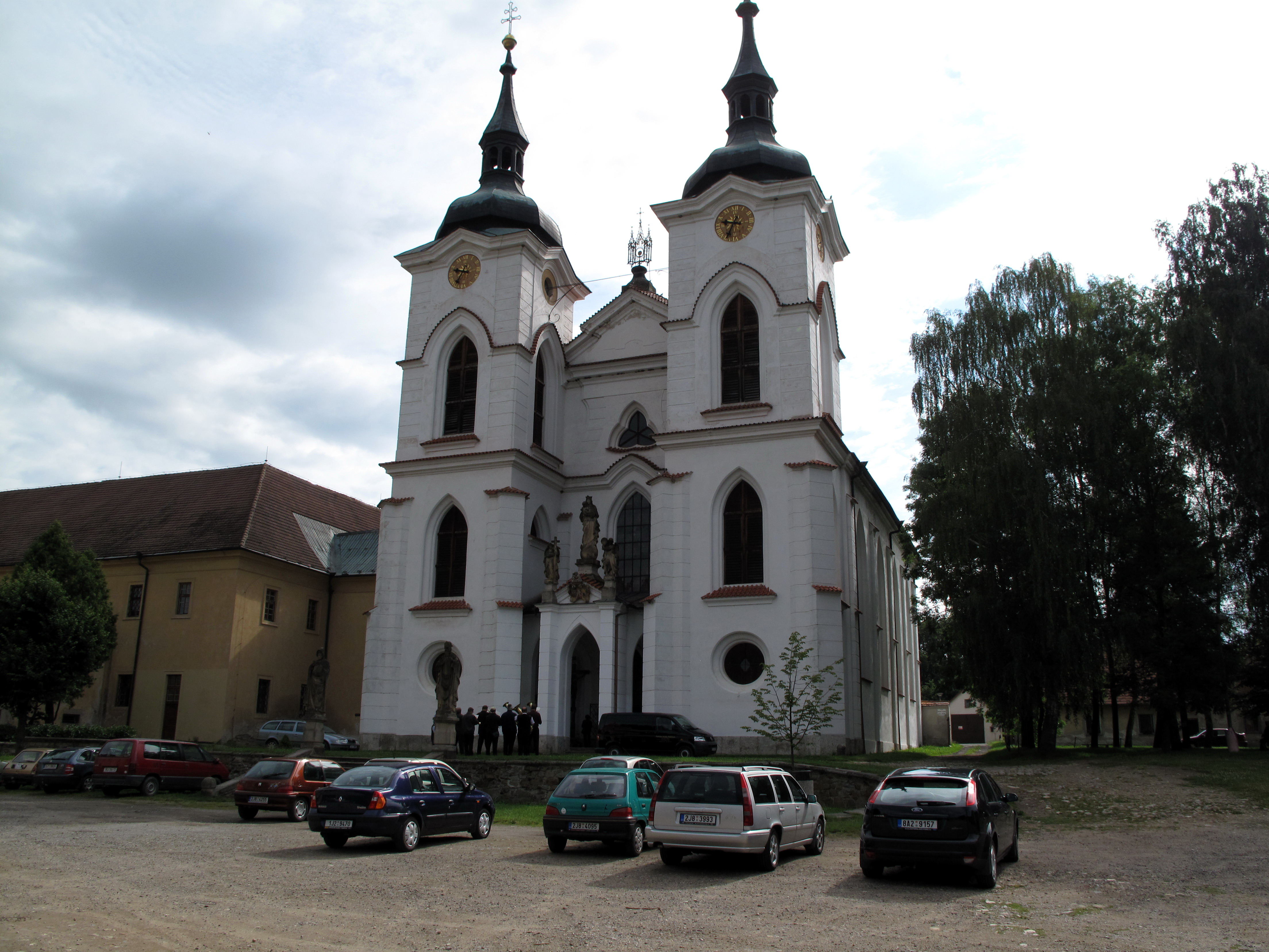 Želiv, klášterní kostel